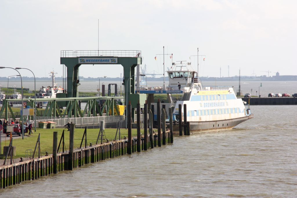 Die Weserfähre in Bremerhaven